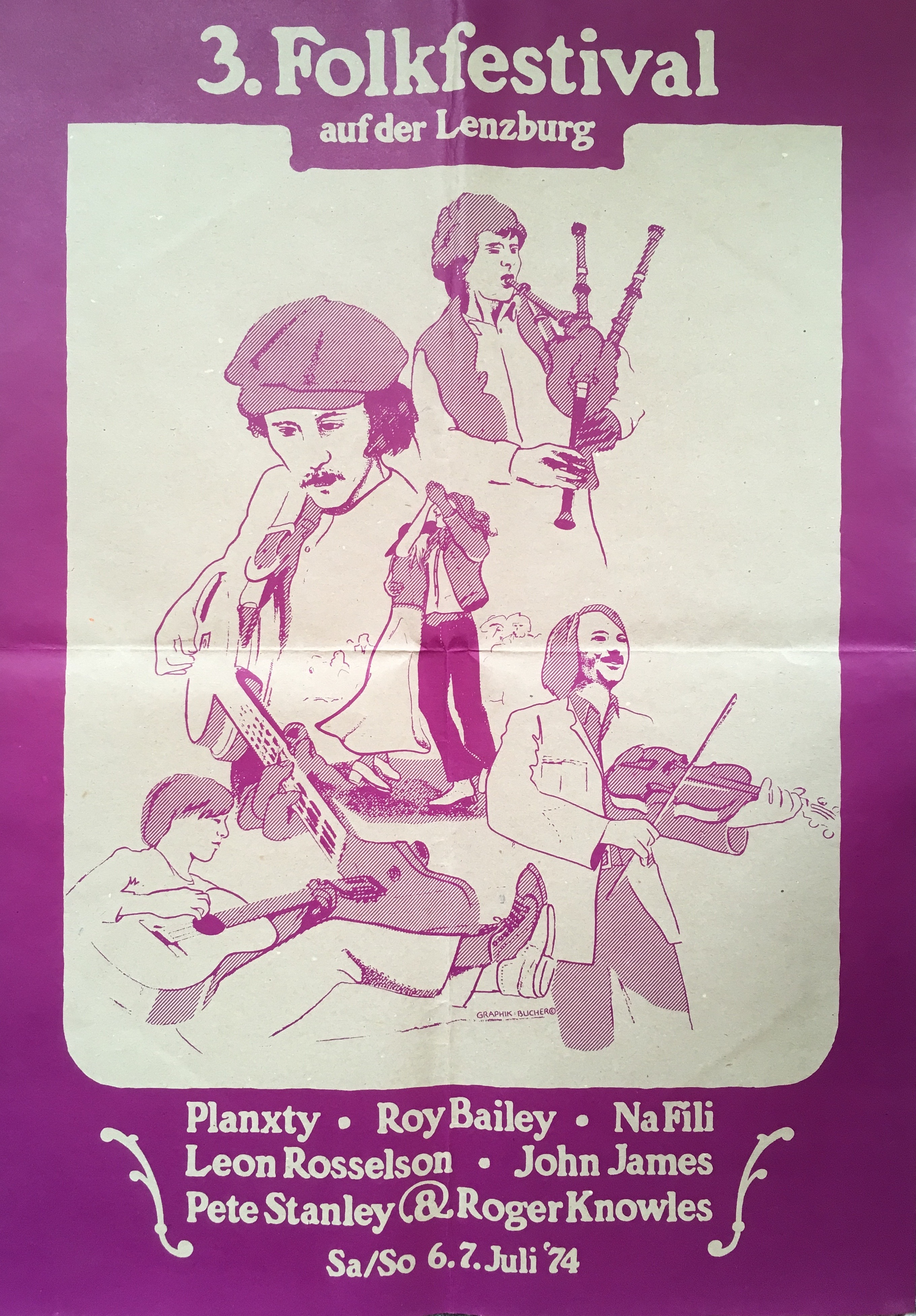 Originalplakat des 3. Folkfestivals auf der Lenzburg (CH) von 1974 mit Auflistung der wichtigsten Infos und Künstler.